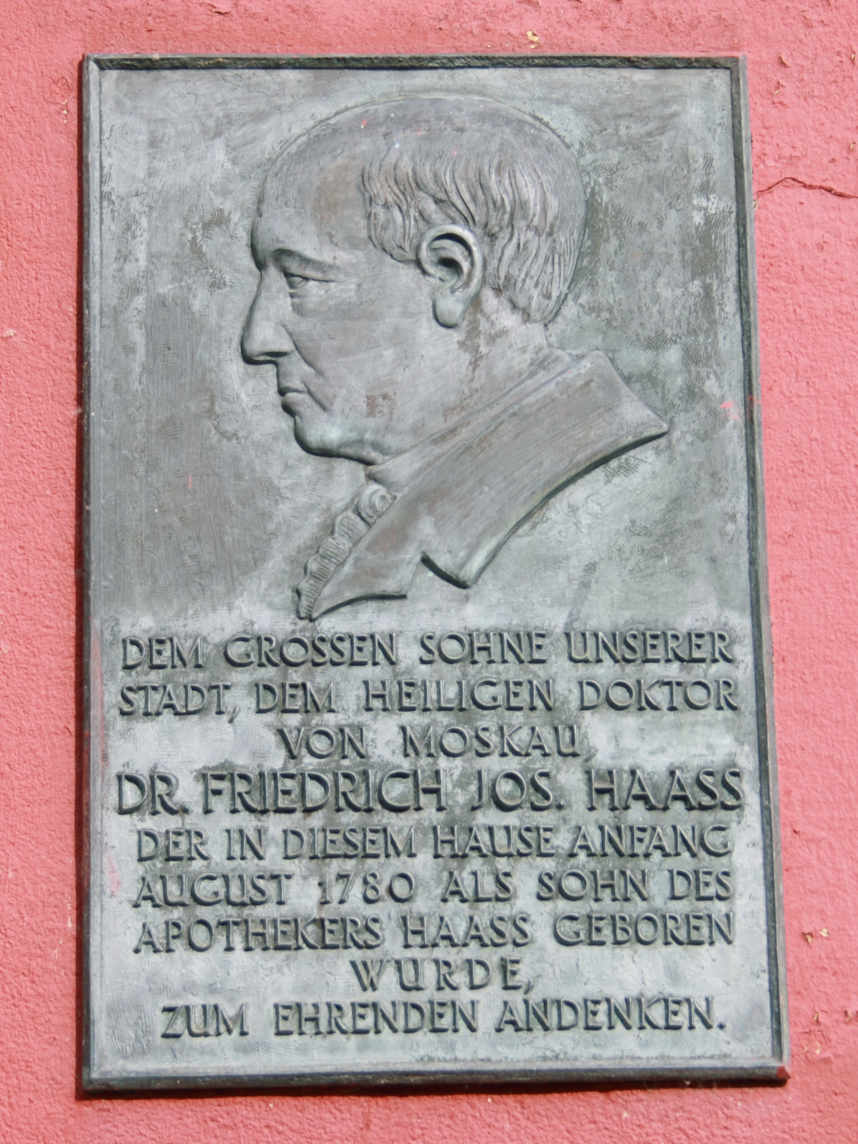 Gedenktafel (an seinem Elternhaus) für Friedrich Joseph Haass in Bad Münstereifel